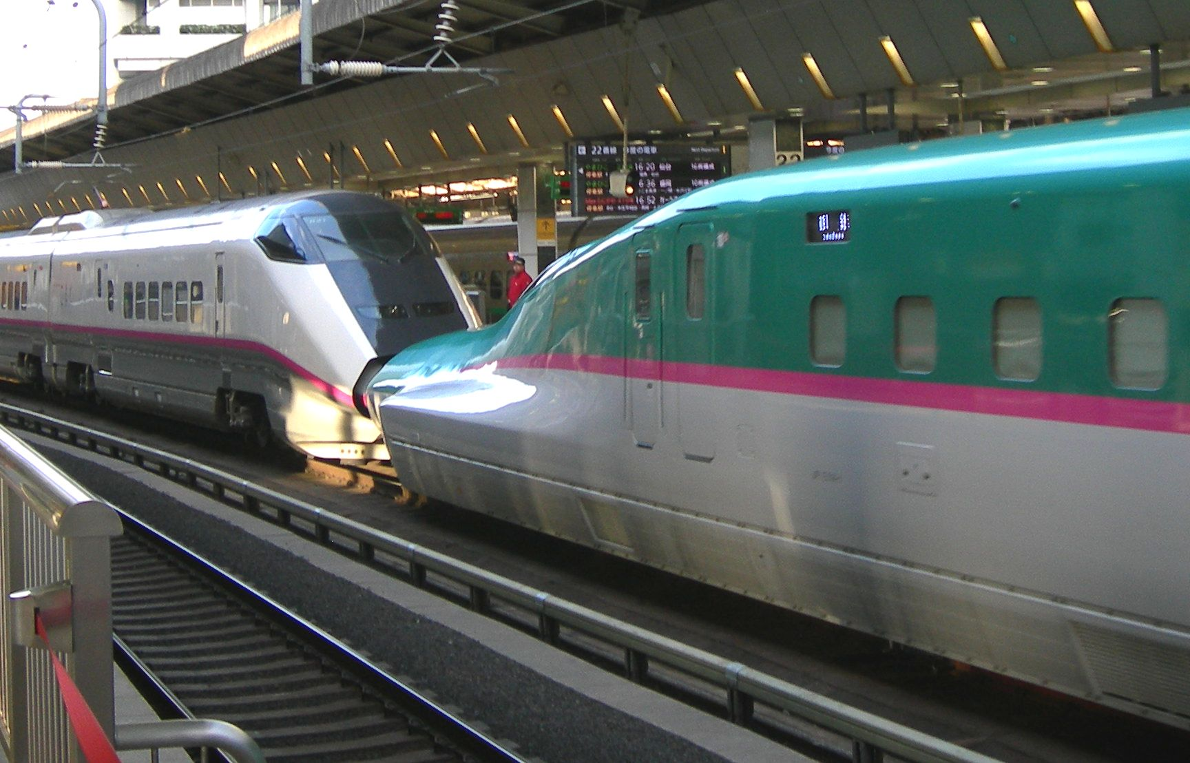 新幹線E3系（秋田新幹線用）・E5系